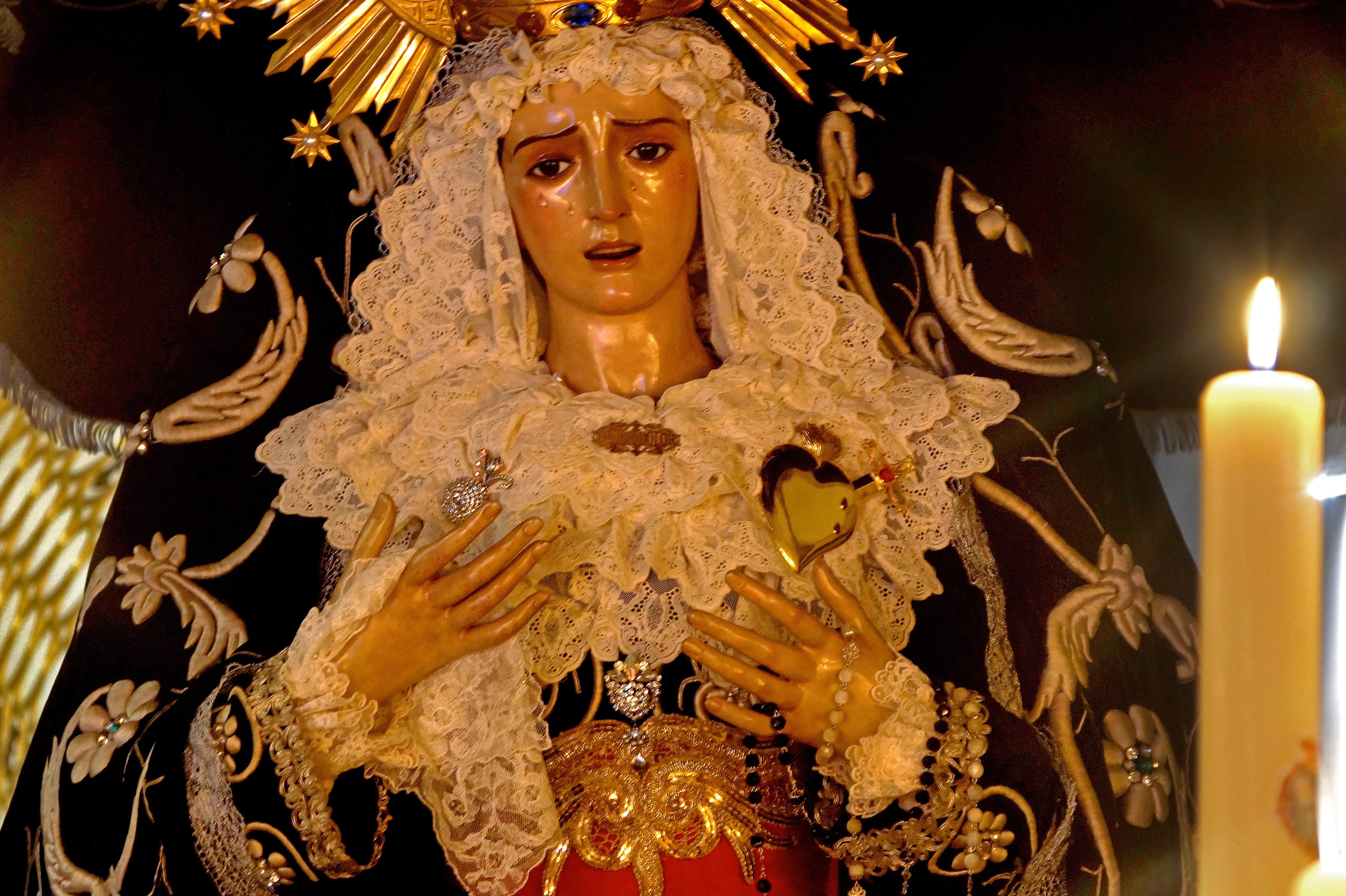 María Santísima del Mayor Dolor en la semana santa del 2016. Badajoz